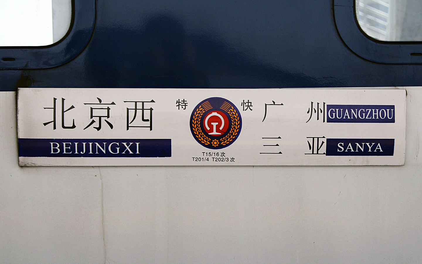 T15/16次列车及T201/204、T202/203共用水牌。